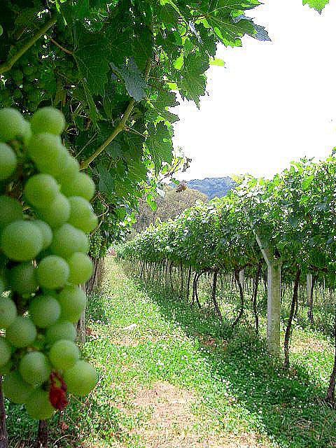 Rangs de vignes sur tuteurs en Y au Brésil